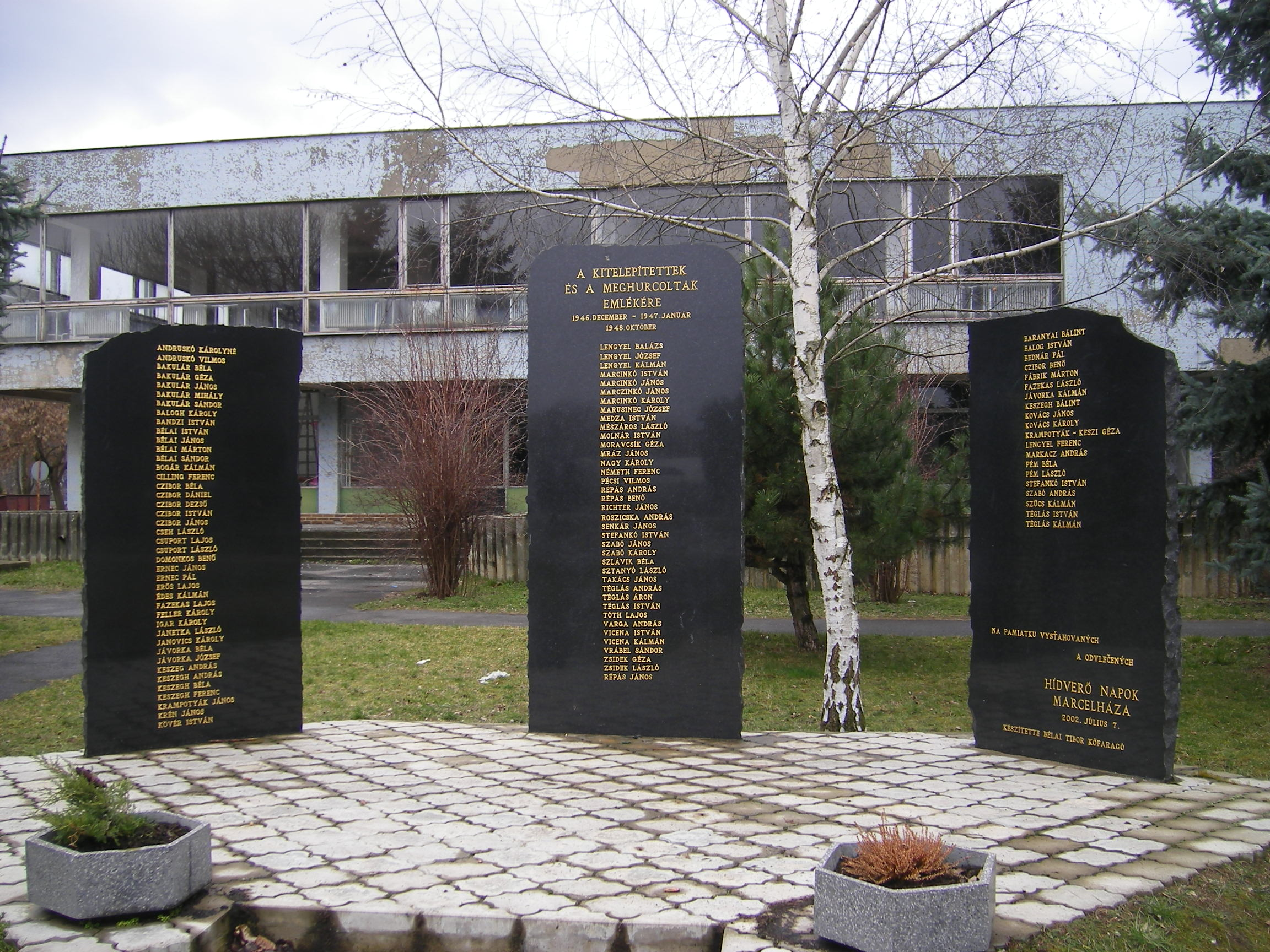 Marcelháza, a kitelepítettek és meghurcoltak emlékműve